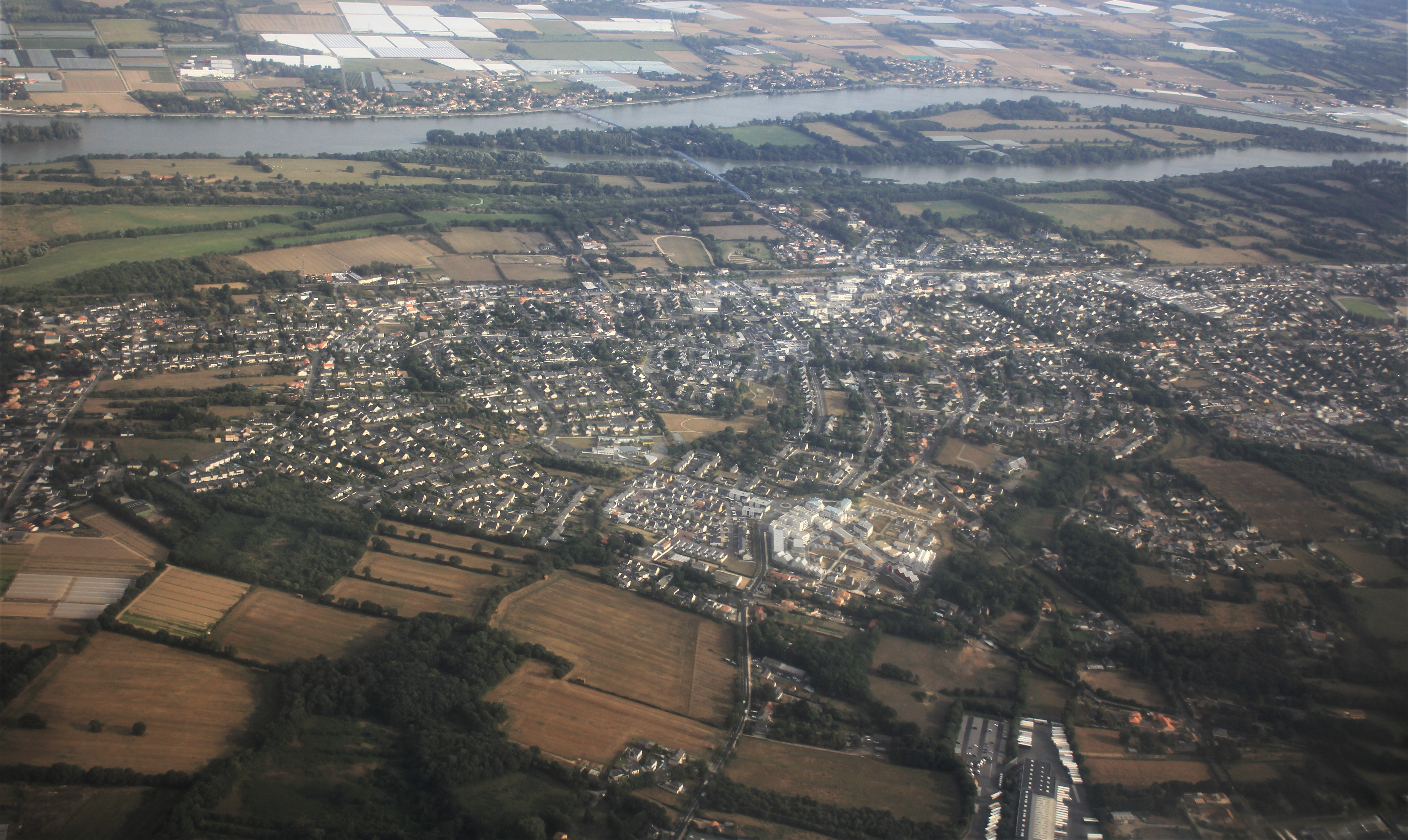 vue d'avion de la commune de Thouaré-sur-Loire en Loire-Atlantique.